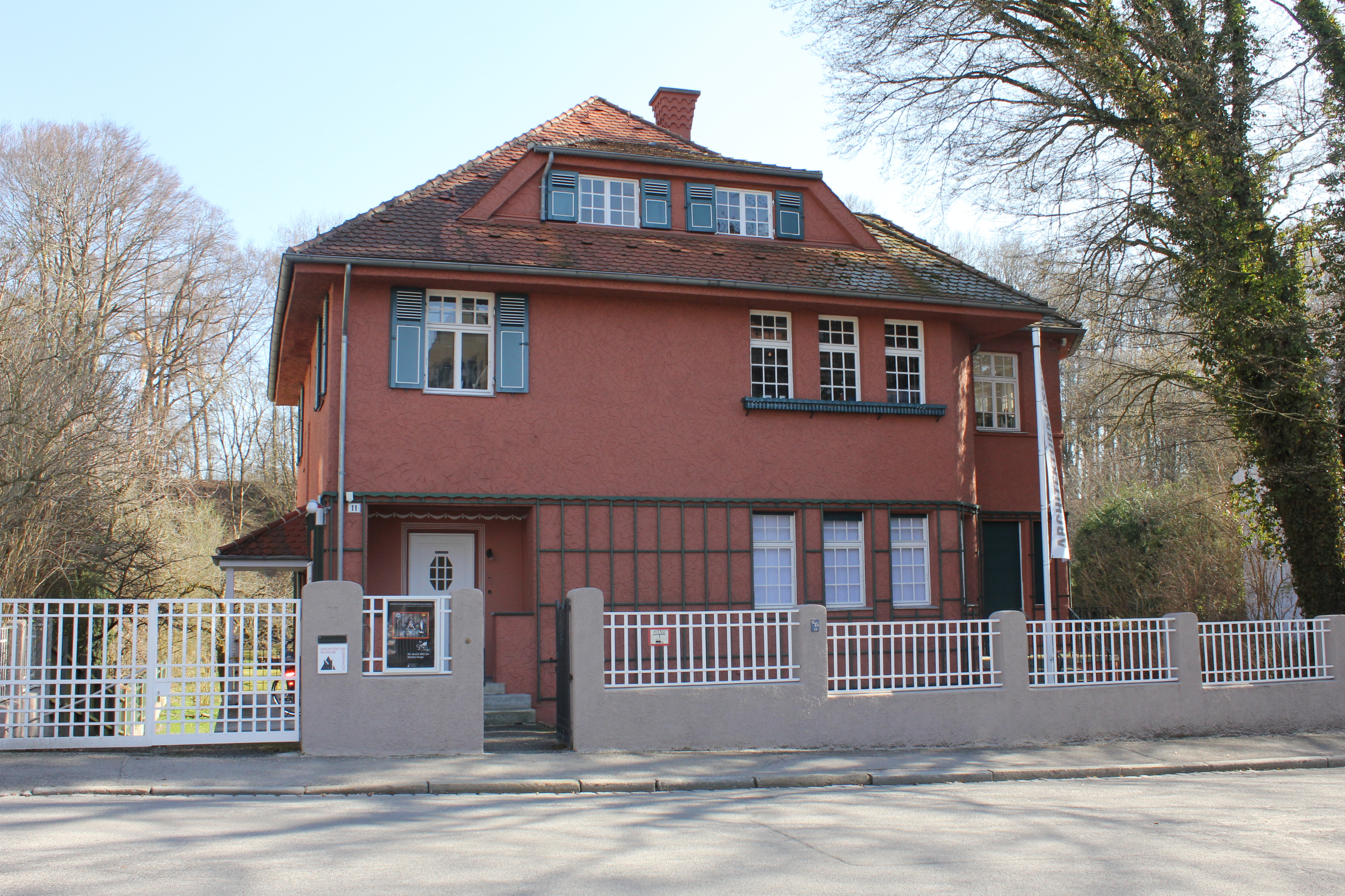 Ehemaliges Wohnhaus von Sebastian Buchegger (Architekt in Augsburg). Heute ist in dem Gebäude das Architekturmuseum Schwaben untergebracht